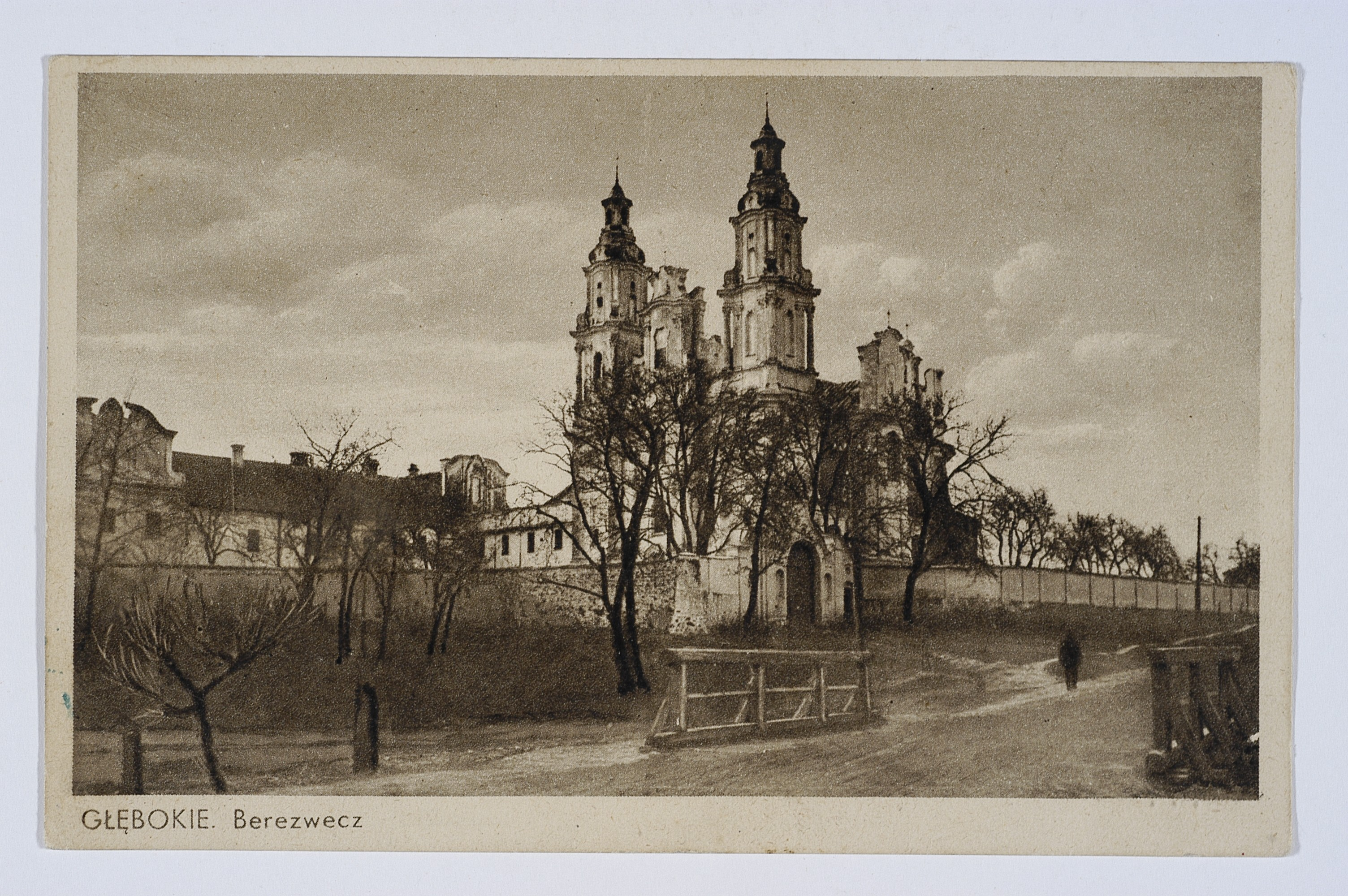 Беларуская (тарашкевіца): Глыбокае (Hłybokaje), Беразьвечча (Bieraźviečča). Царква і манастыр базылянаў